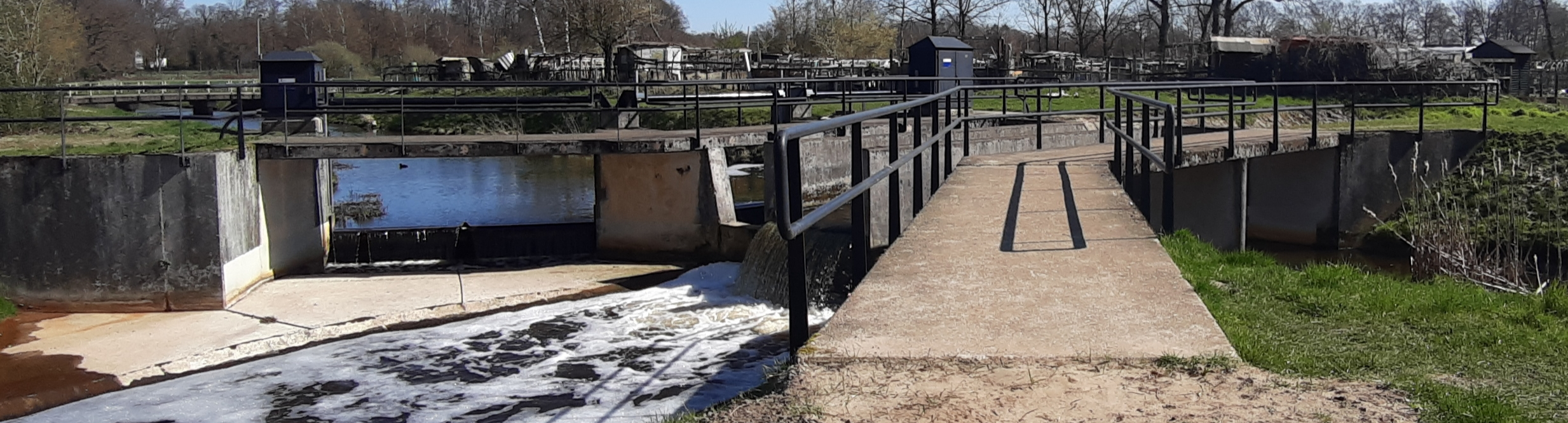 Fox-verdeelwerk Hengelo (Overijssel). Links stroomt de Schoonwaterleiding en vanaf voor gezien de Koekoeksbeek.